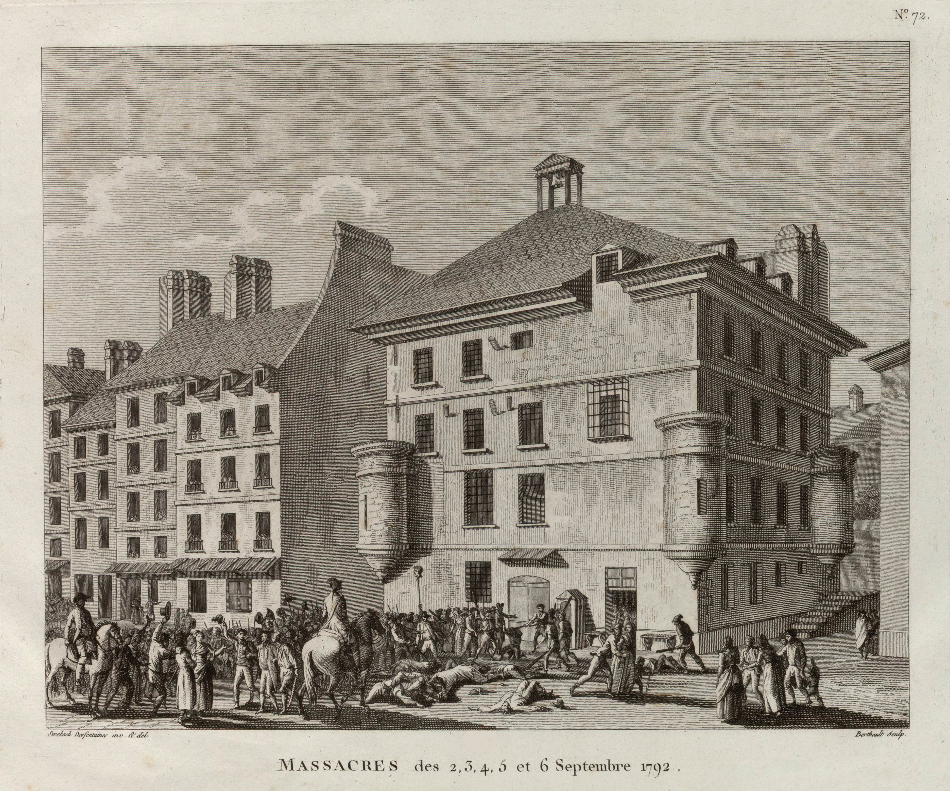 Les massacres de Septembre. Tableau nº 72, extrait de la Collection complète des tableaux historiques de la Révolution française.